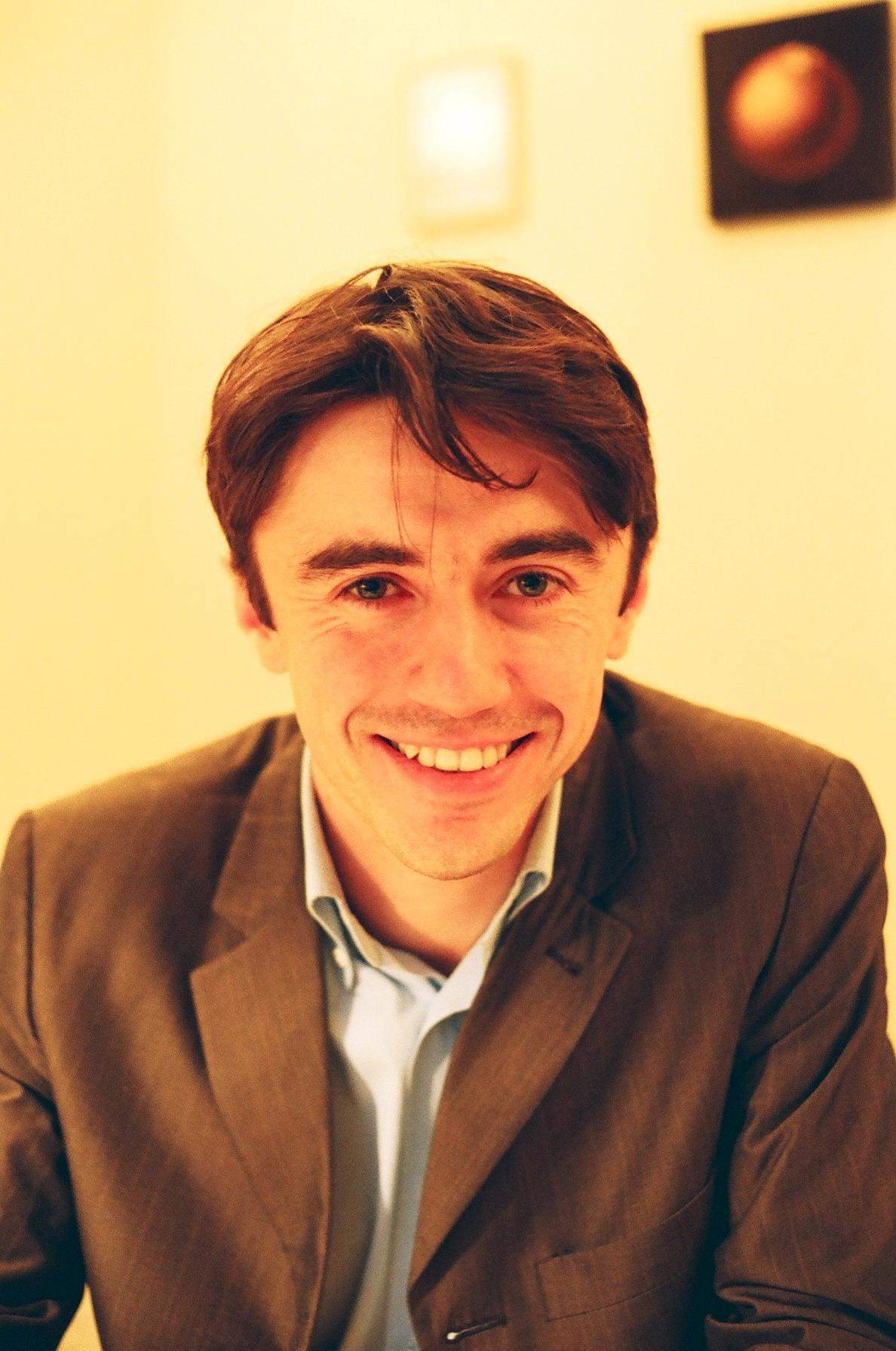 Yann Wehrling interviewé à son bureau des Verts